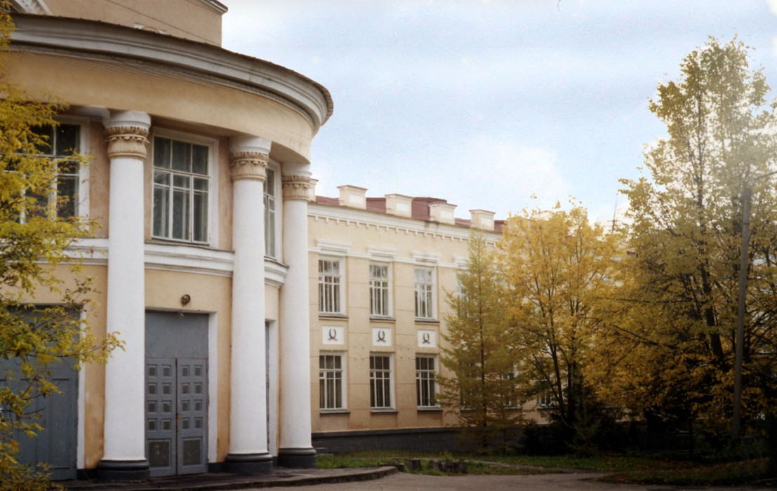 Дворец культуры